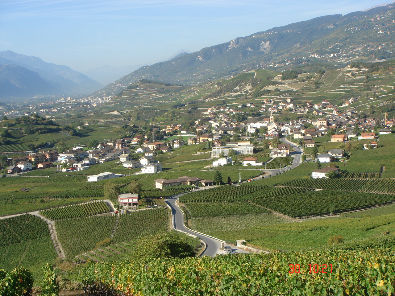 Vue de Salquenen en Valais